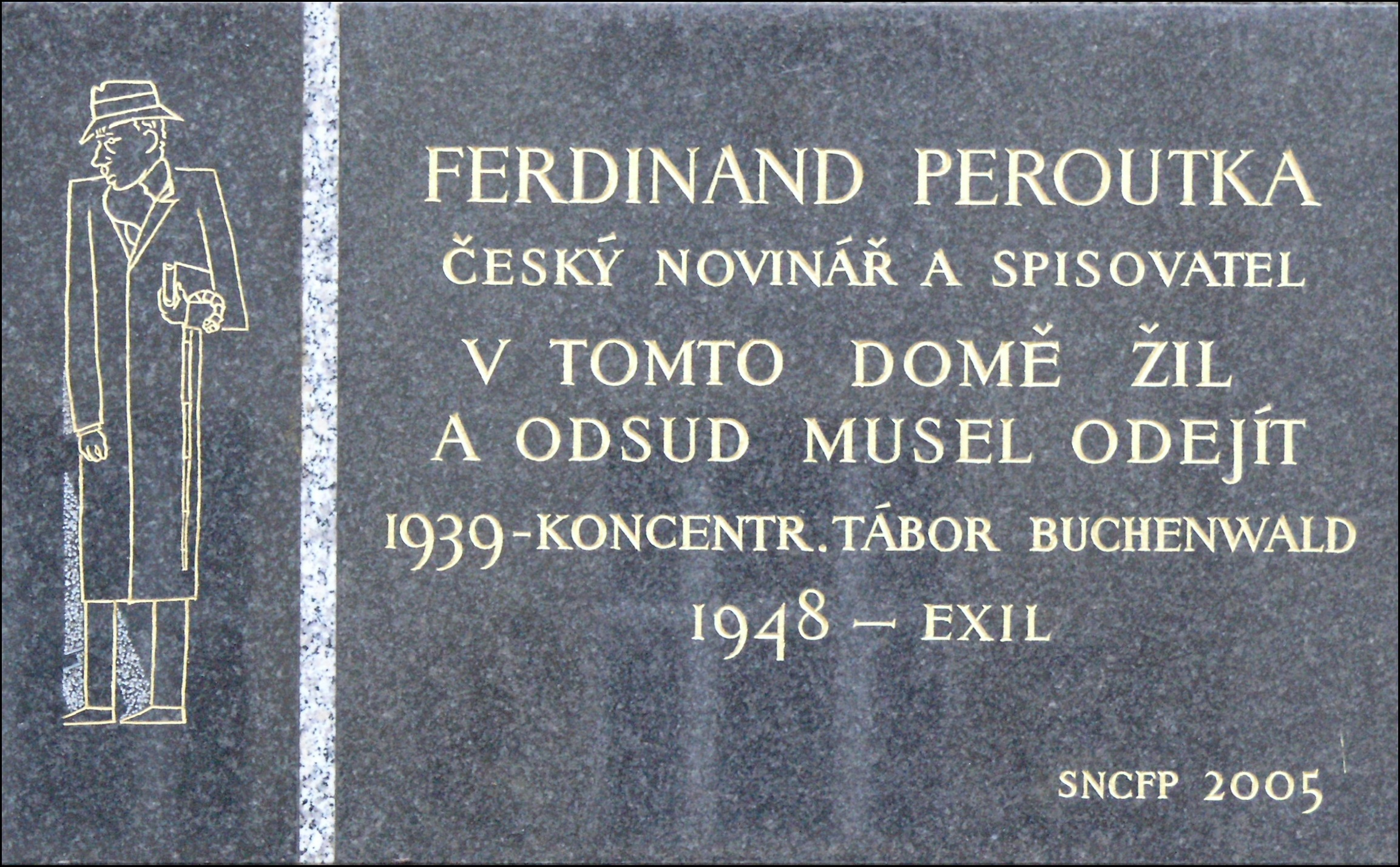 Pamětní deska na domě ve kterém žil Ferdinand Peroutka, Praha-Smíchov, Matoušova ulice.